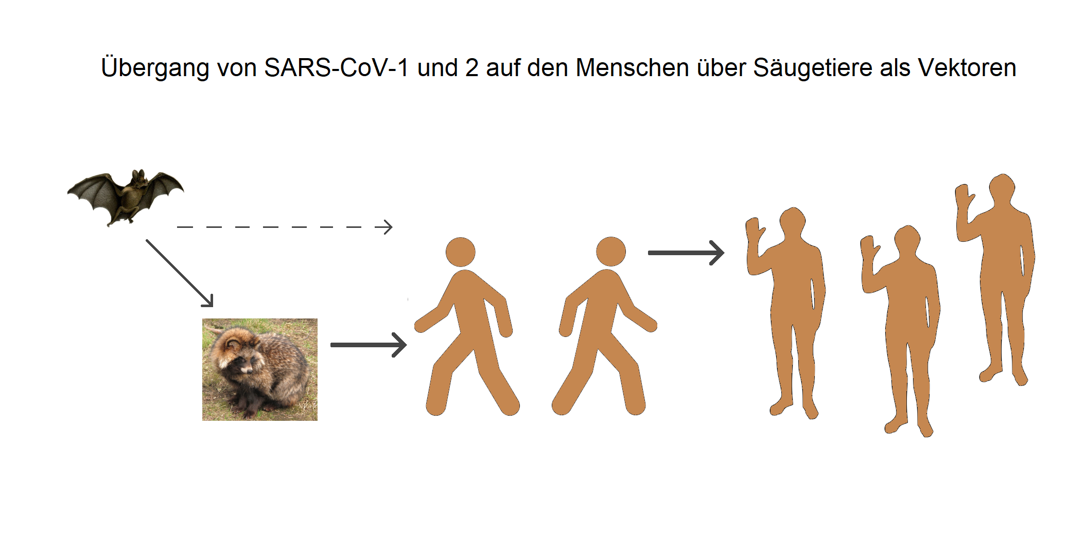 Übergang von SARS-CoV-1 und SARS-CoV-2 über Säugetiere als Vektoren auf den Menschen und Beginn der Mensch-zu-Mensch-Übertragung.